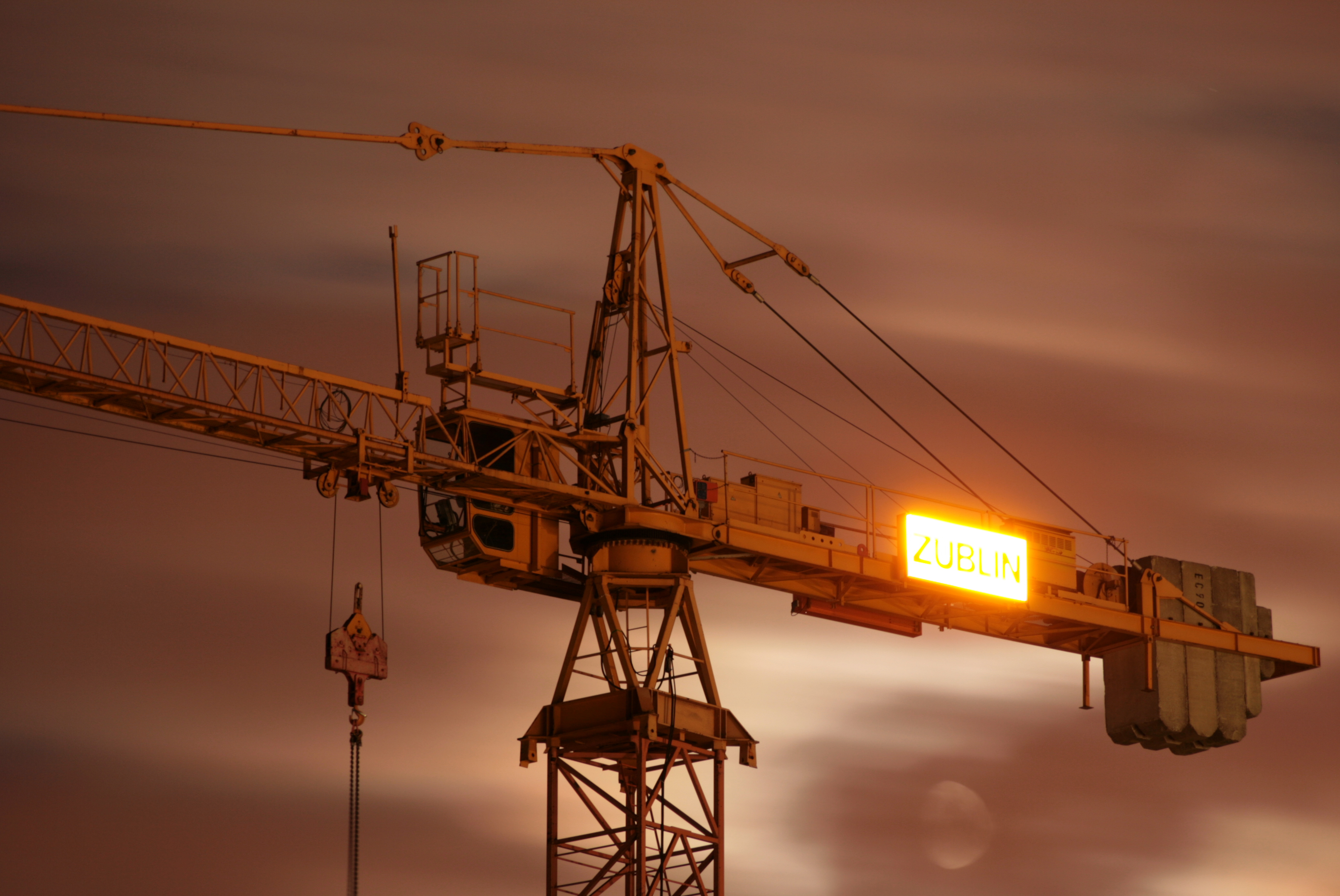 Nachtaufnahme eines Krans auf einer Hamburger Baustelle